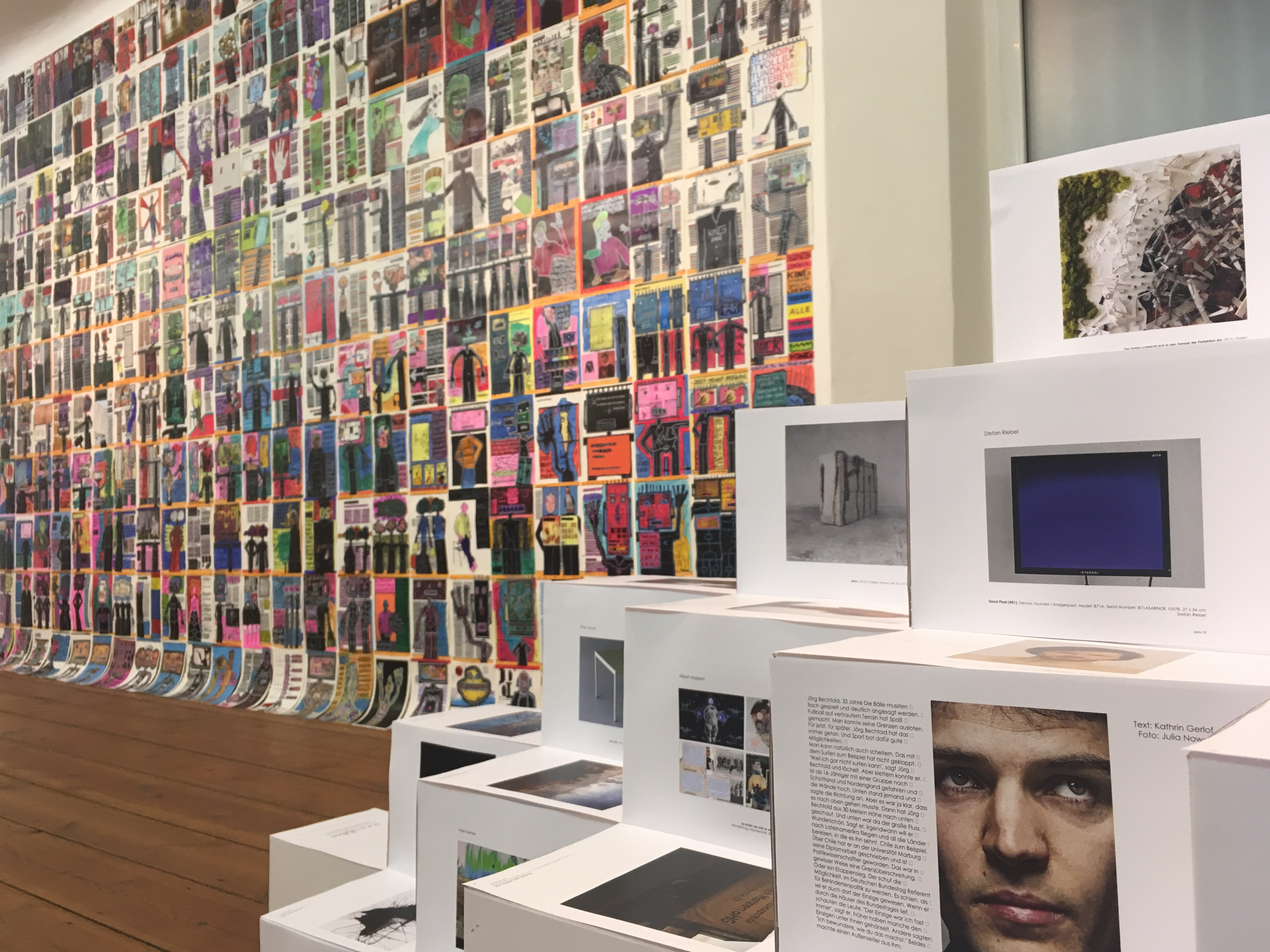 Installation King Oxxo's Diktatur von Oliver Orthuber in der G.A.S.-station Berlin, März 2020